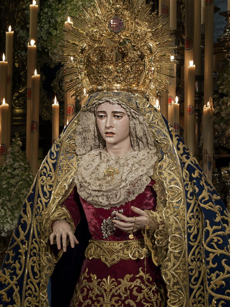 Virgen de la Concepción. Titular la de Hermandad del Silencio. Obra de Sebastian Santos Rojas. Sevilla, Andalucía, España.